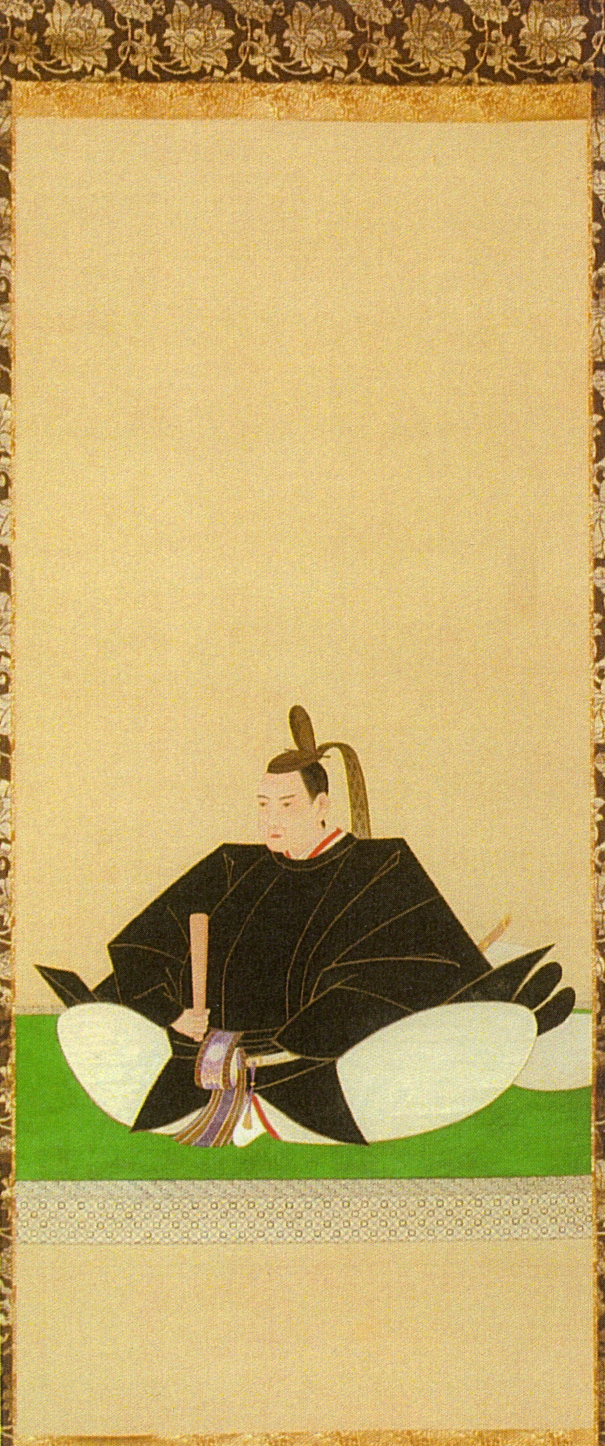 宗義章の肖像。